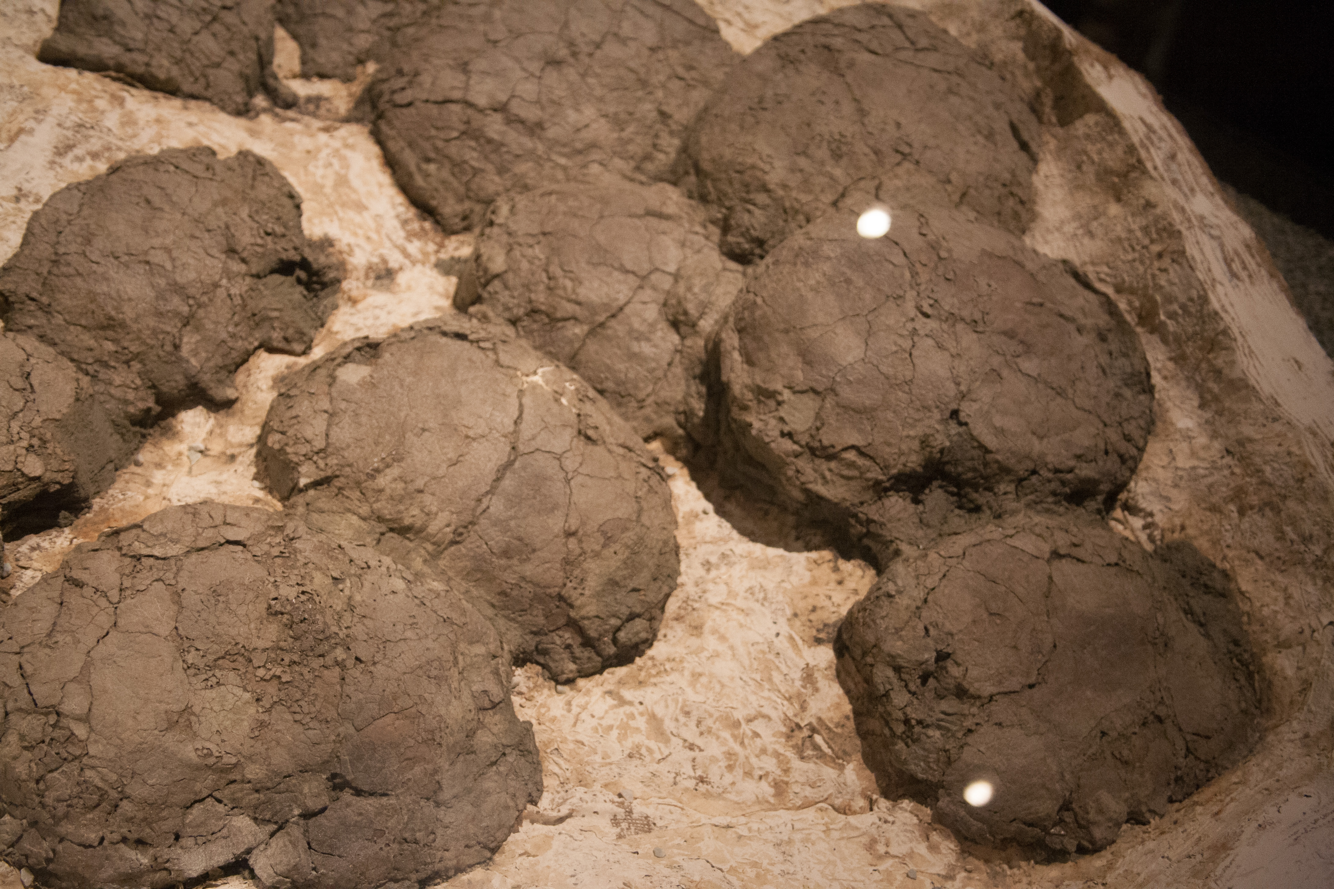 5d-dinosaur-camp-day2-20120802-59.jpg